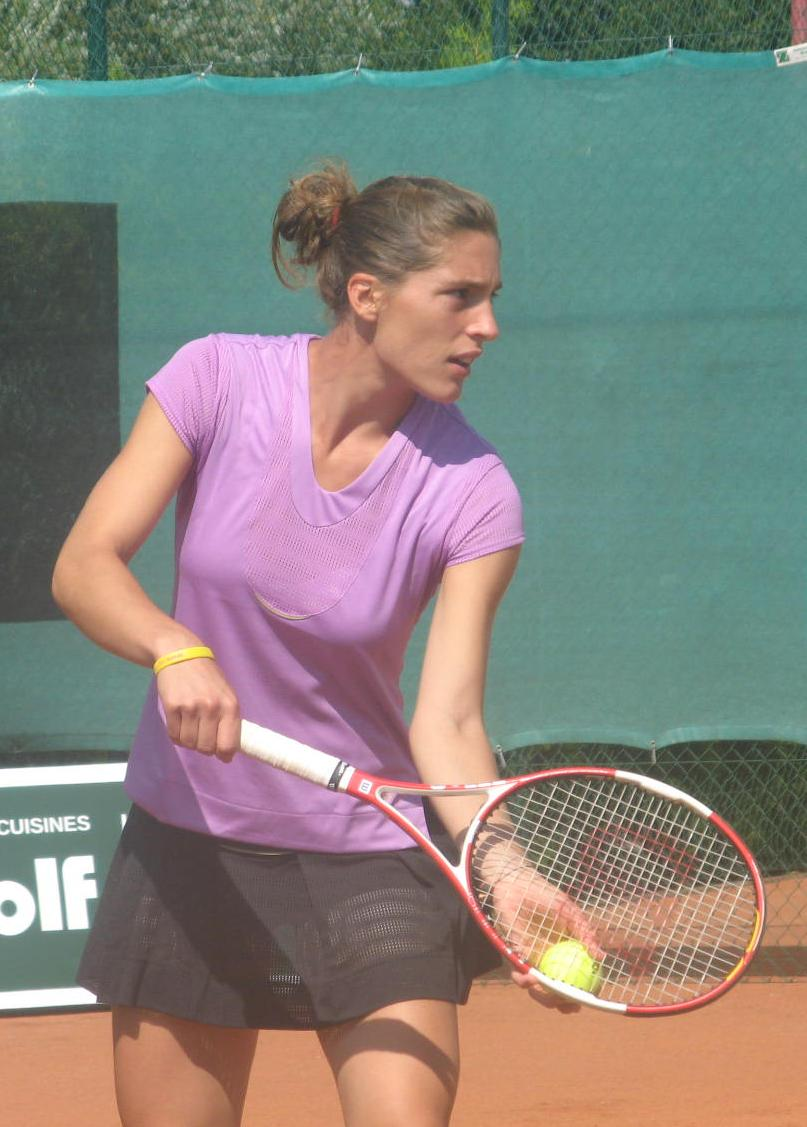 Andrea Petkovic beim mit 75.000$ dotierten ITF-Turnier in Pétange/Luxemburg